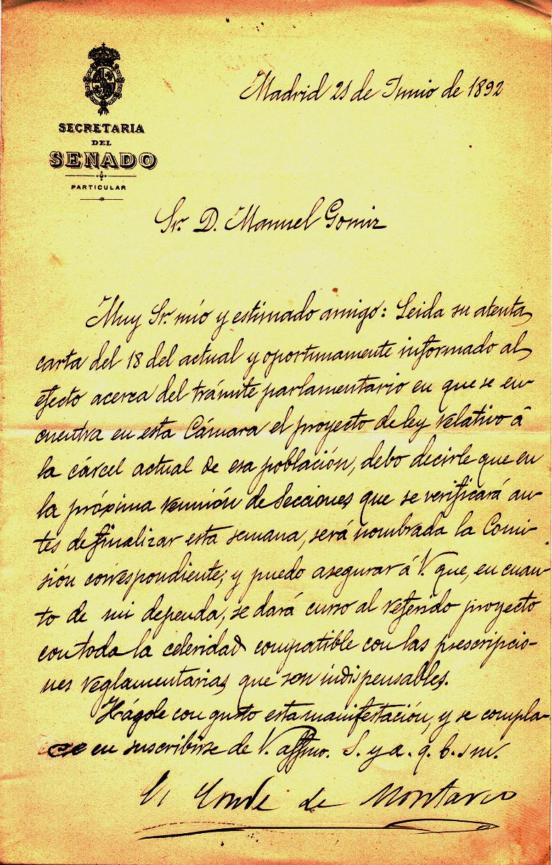 El conde de Montarco, Senador vitalicio, comunica a D. Manuel Gomiz, alcalde de Alicante, los avances del proyecto de Ley de la nueva Carcel para su ciudad